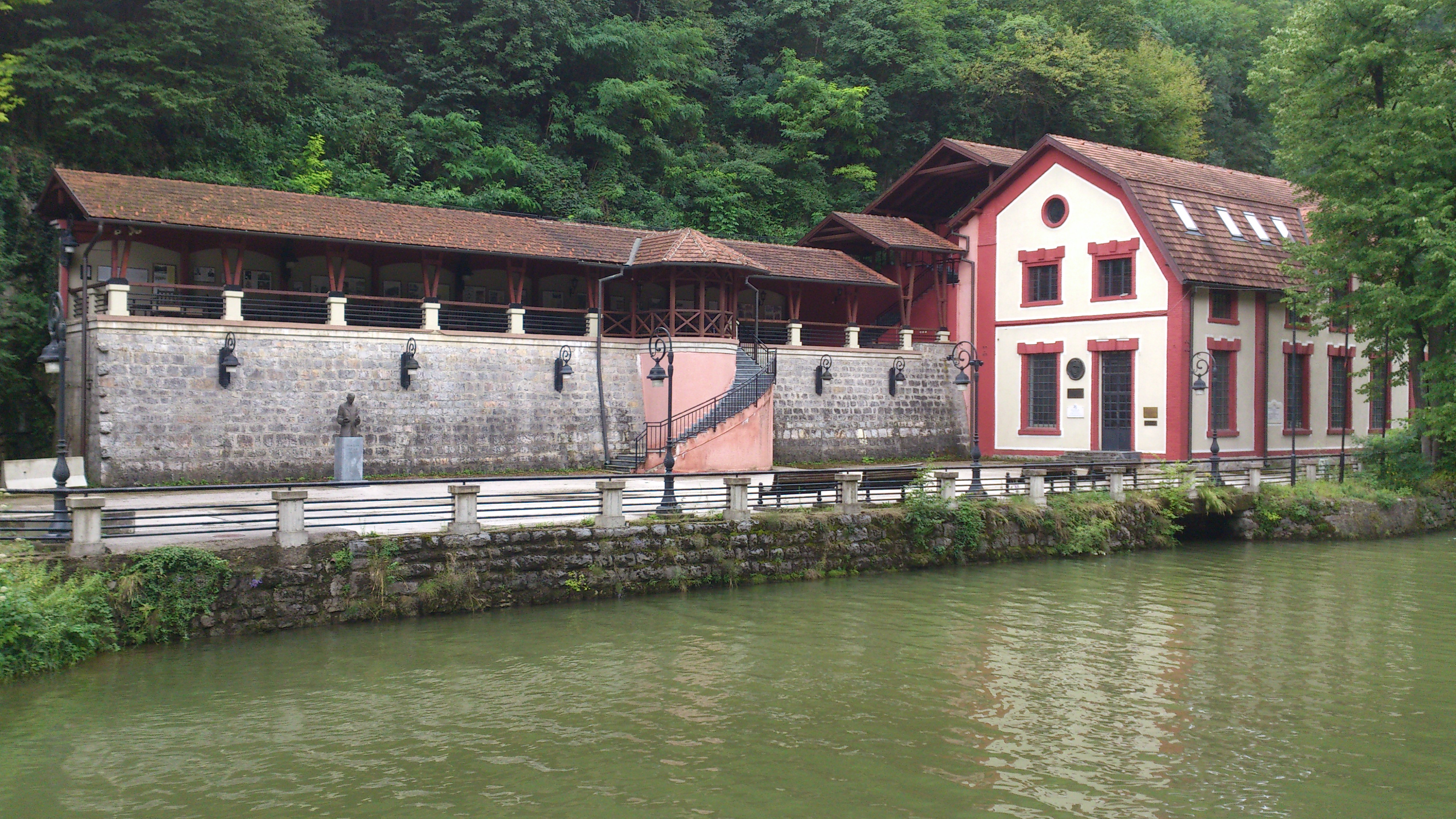 Vodní elektrárna v Đetinji v blízkosti staré pláže, kteár byla vybudována jako první vícefázová elektrárna podle návrhu Nikoly Tesly